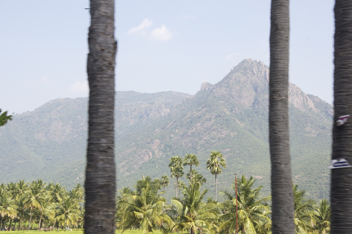 நாமக்கல் மாவட்டம் பேளு�க்குறிச்சியில் இருந்து கொல்லிமலையின் தோற்றம்.